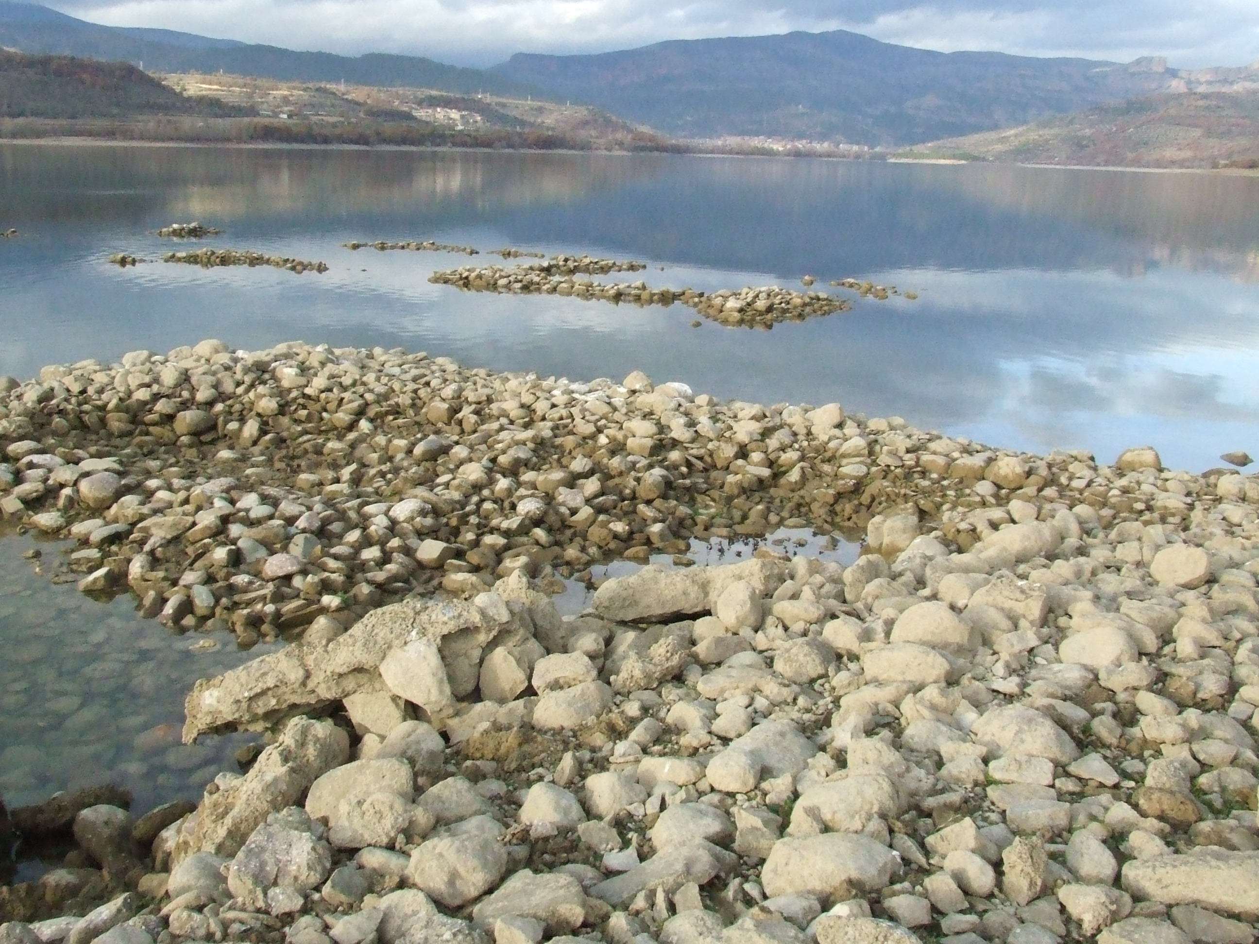 Restes de Sant Miquel (Aramunt, Conca de Dalt, Pallars Jussà)